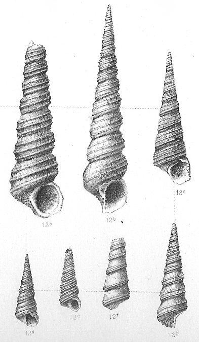 Turritella incrassata - Fossil gastropod from Pliocene deposits near Antwerp (Belgium)